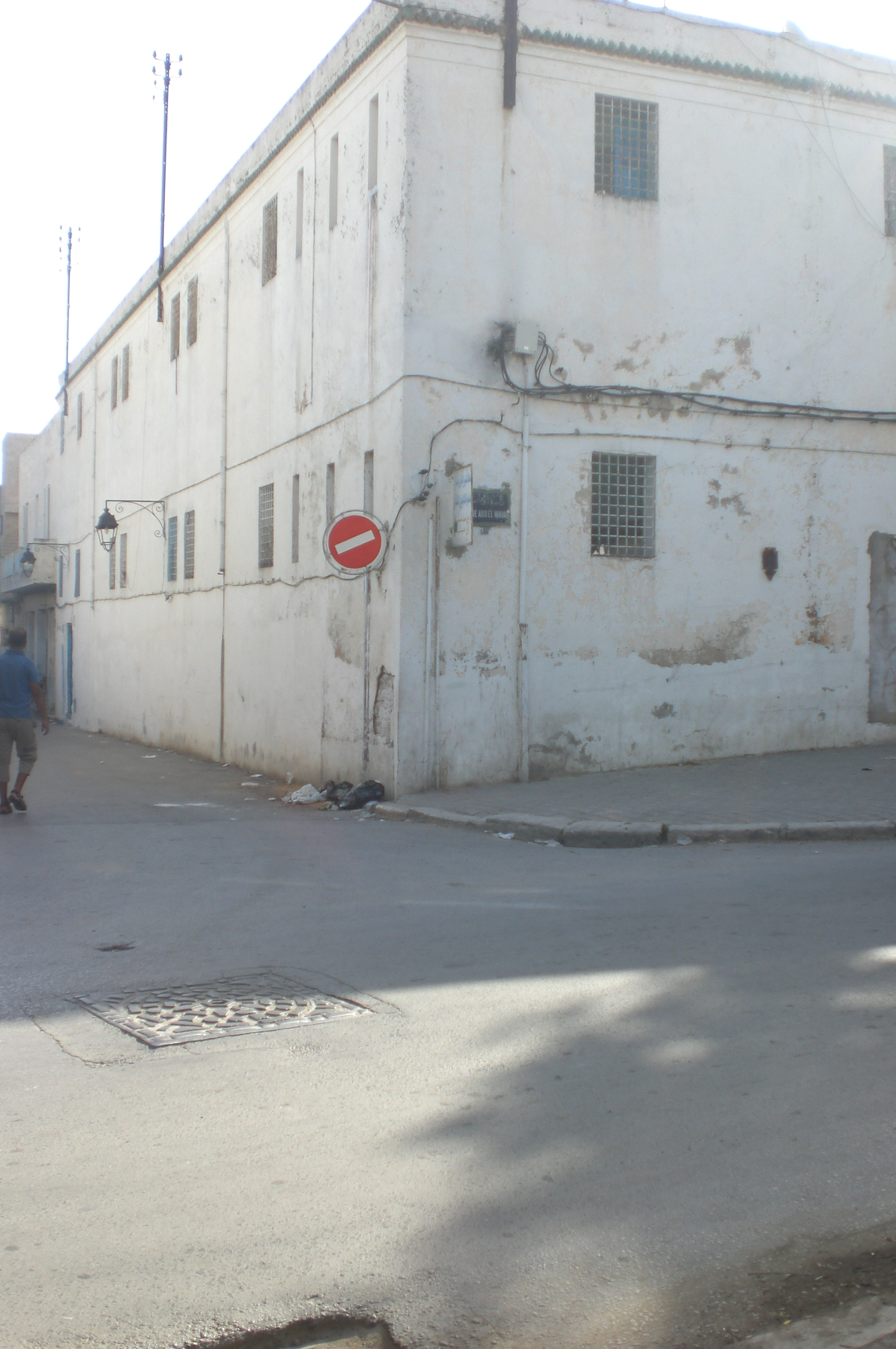 Medersa Habibia Kobra-Tunis